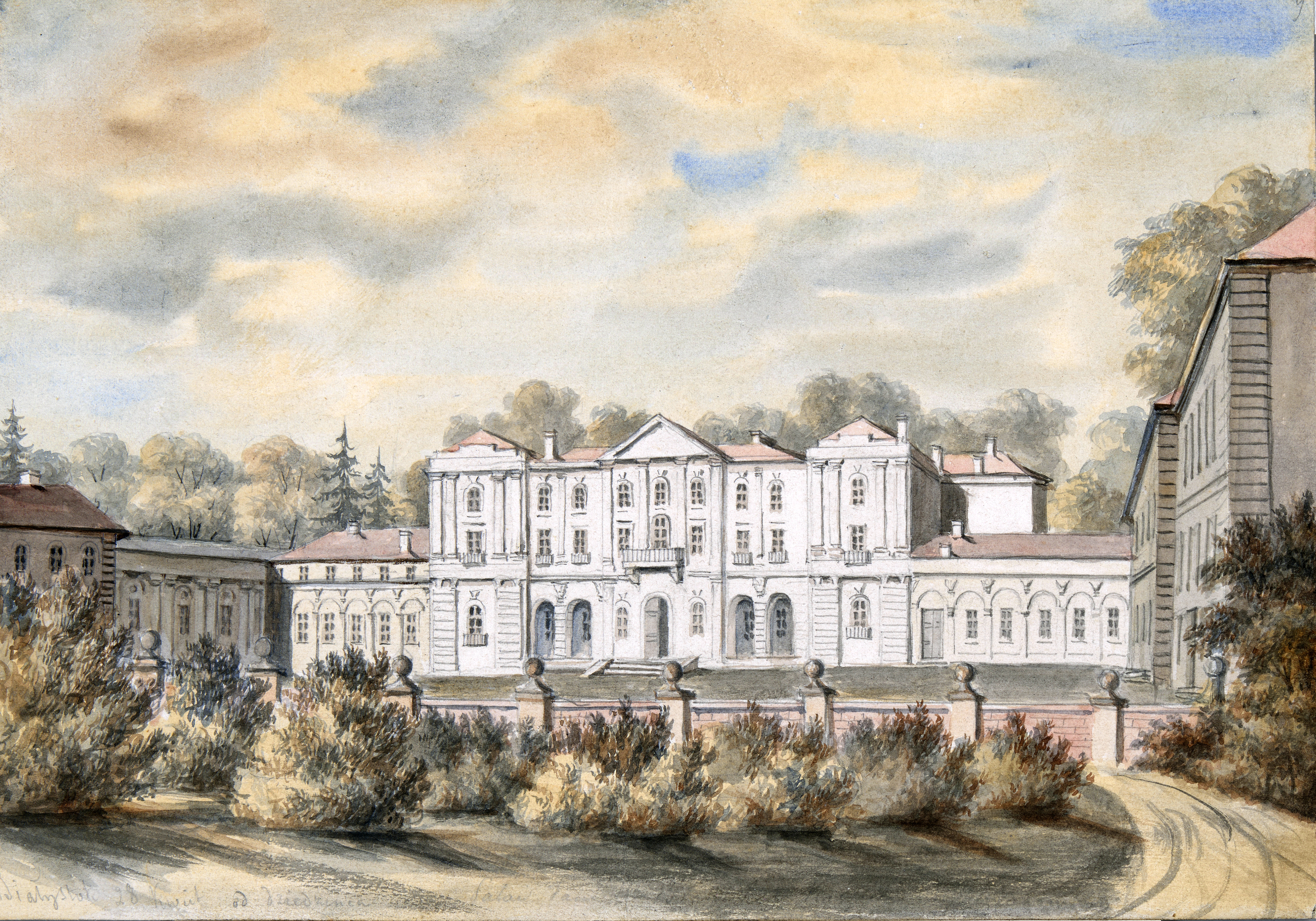 Беларуская (тарашкевіца): Беласток (Biełastok), палац Браніцкіх (Branicki)